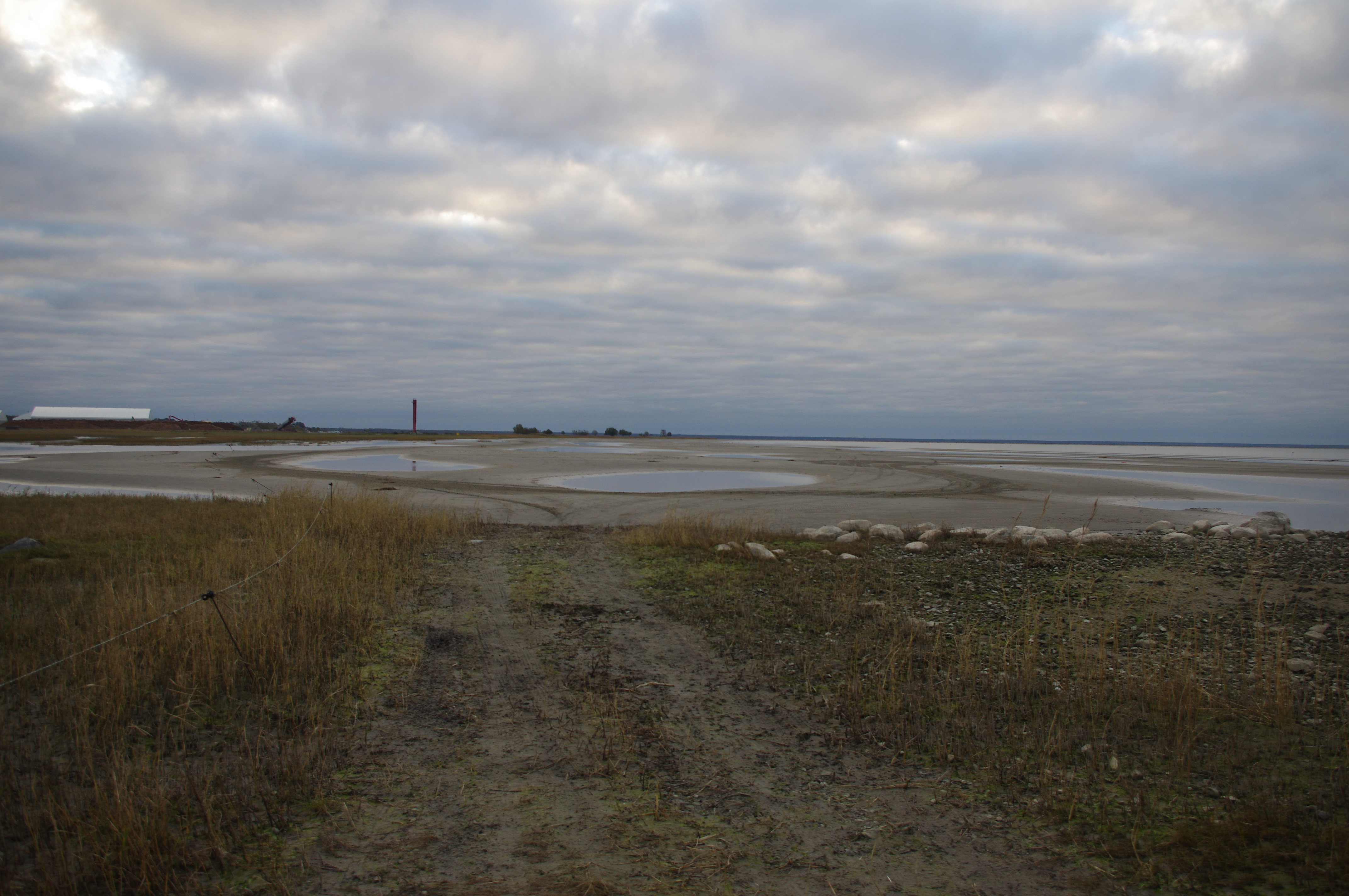 Vana-Pärnu rand sügisel 2016